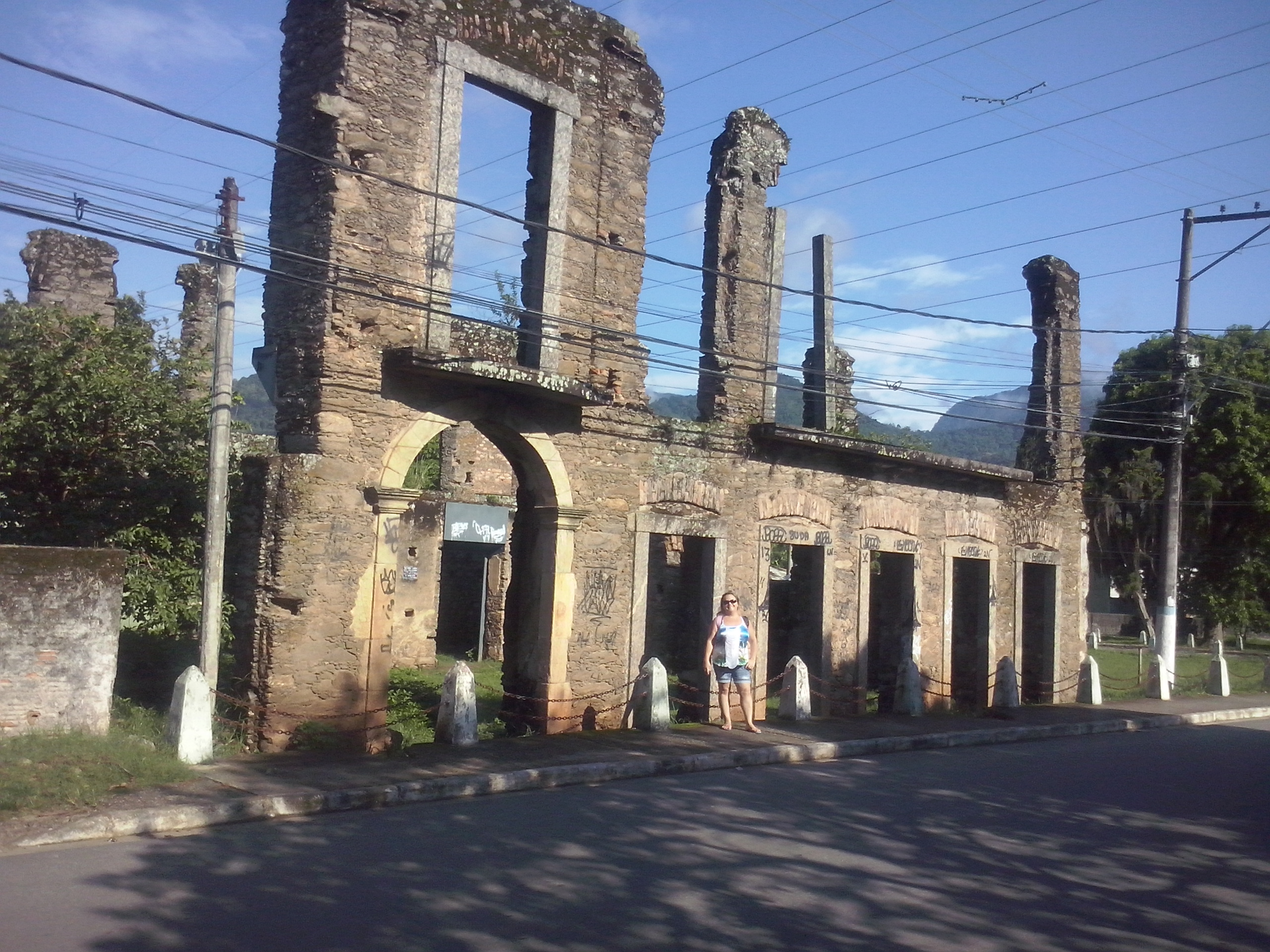 O Saco de Mangaratiba,antigo estreito invadido pelo mar,fica no fundo da baia do mesmo nome.RJ.